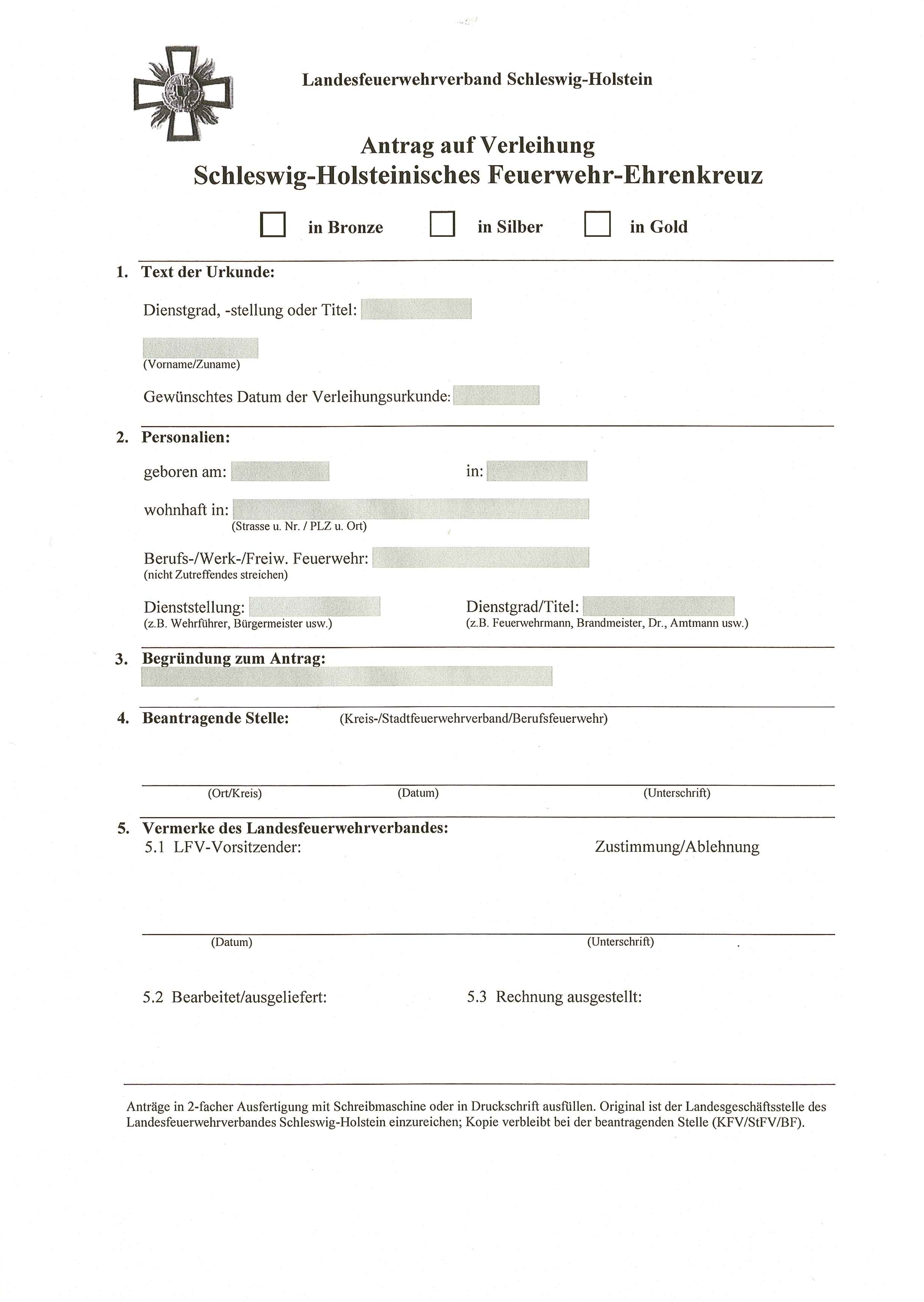 Antrag auf Verleihung des Schleswig-Holsteinischen Feuerwehr-Ehrenkreuzes